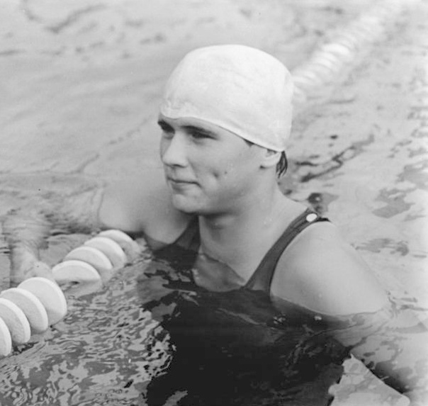 Eva Wittke Zentralbild Kluge Sche 17.8.1968 Leipzig: Deutsche Meisterschaften der DDR im Sportschwimmen-Sieg für Eva Wittke am 16.8.68 Den Titel über 1 00 Meter Brust der Frauen holte sich erwartungsgemäß die Leipzigerin Eva Wittke (SC DHfK) in 1:19,6 Minuten. Sie verteidigte damit ihren Titel aus dem Vorjahr mit Erfolg.